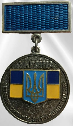 нагрудний знак із зображенням на фоні Прапора України Герба України з надписами УКРАЇНА ветеран оргпнів внутрішніх справ